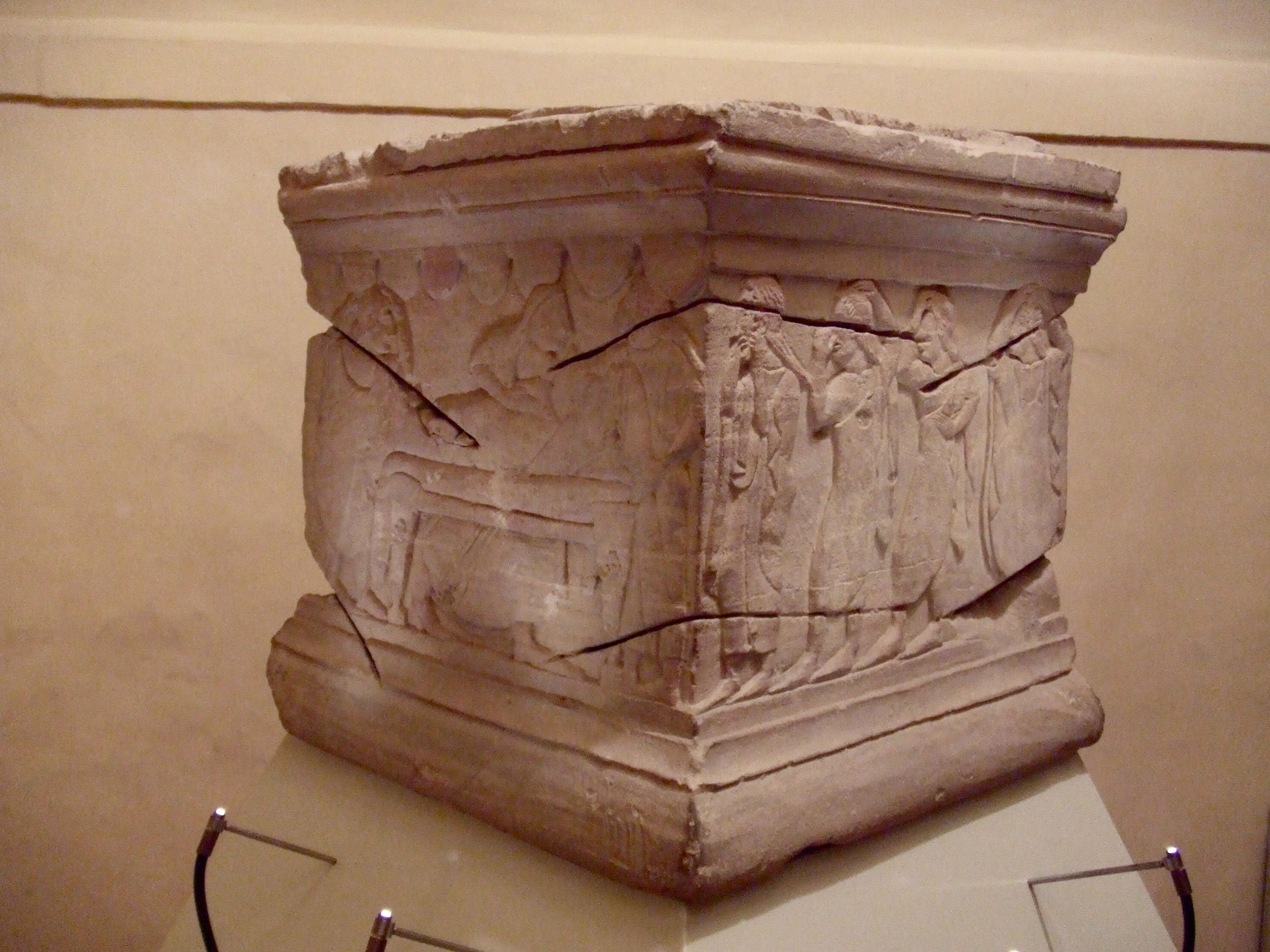 Cippe en pietra fetida au musée archéologique de Sarteano